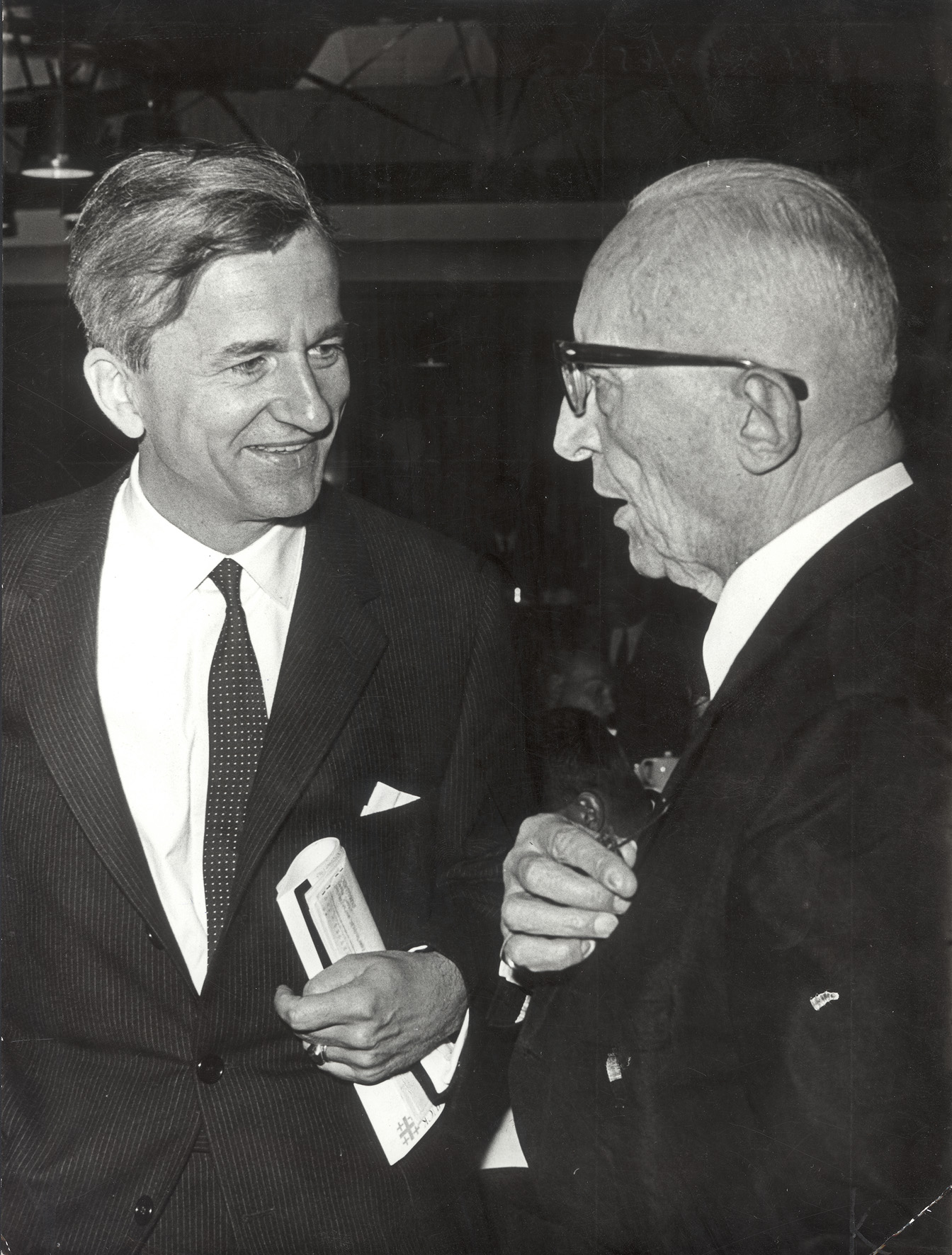 Deutscher Evangelischer Kirchentag Köln 1965, Kirchentagspräsident Richard von Weizsäcker und Ehrenpräsident Reinold von Thadden-Trieglaff (13.08.1891-10.10.1976, bis 1964 Kirchentagspräsident), Foto: Hans Lachmann (23/6372), Fotosammlung: Presseverband, Nr. 4259, Bestand: AEKR Düsseldorf 8SL 046 (Bildarchiv), 13_19650000A